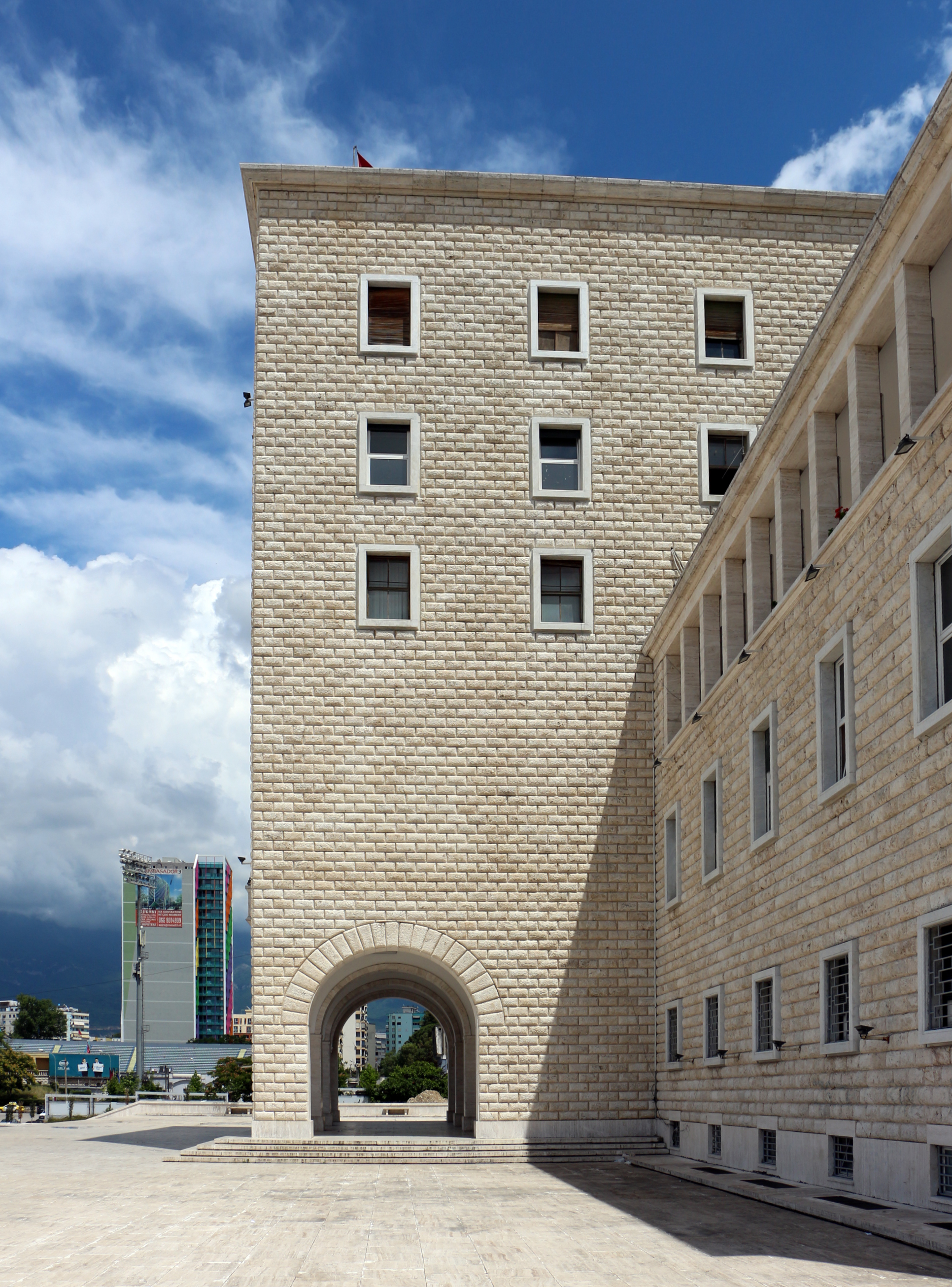 Universiteti I Tiranes